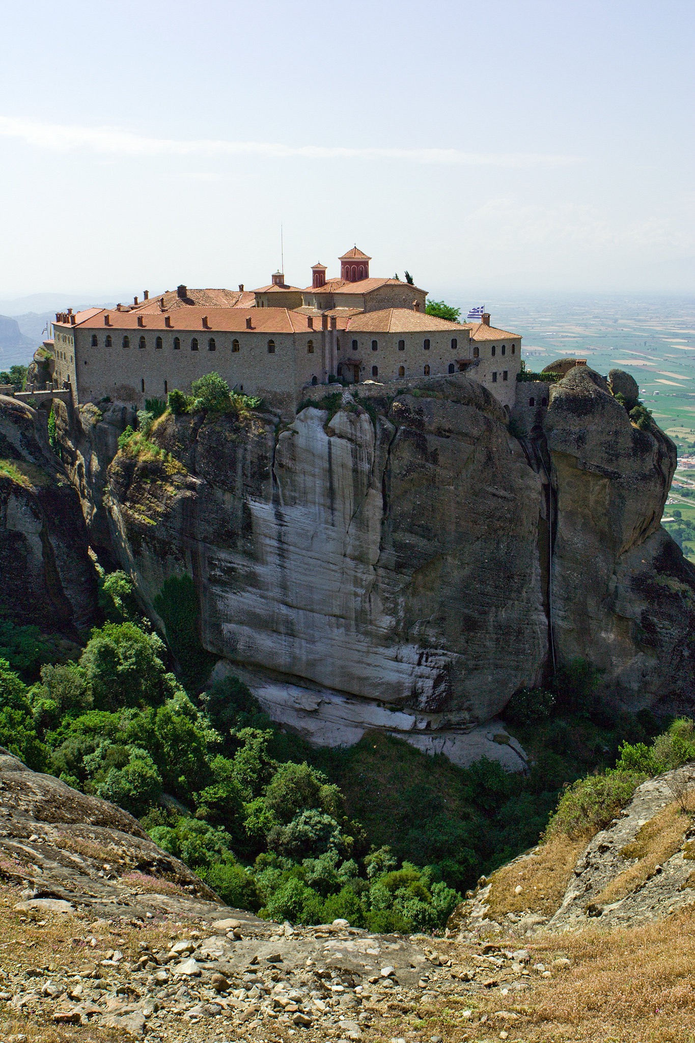 Moni Agio Stefano, Meteora, Greece